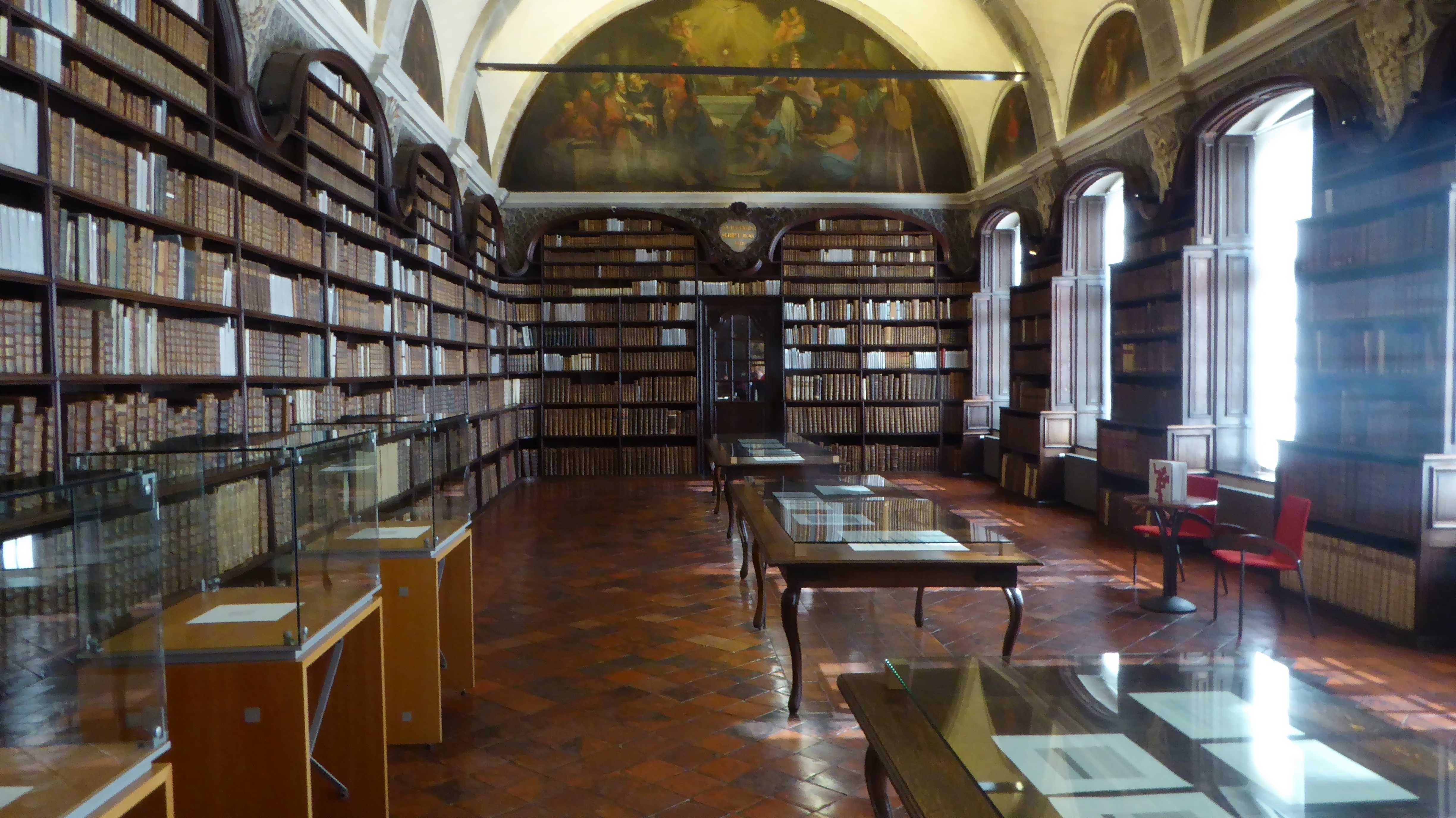 Valenciennes la Bibliothèque municipale Nord (département français). This building is en partie classé, en partie inscrit au titre des Monuments Historiques. .